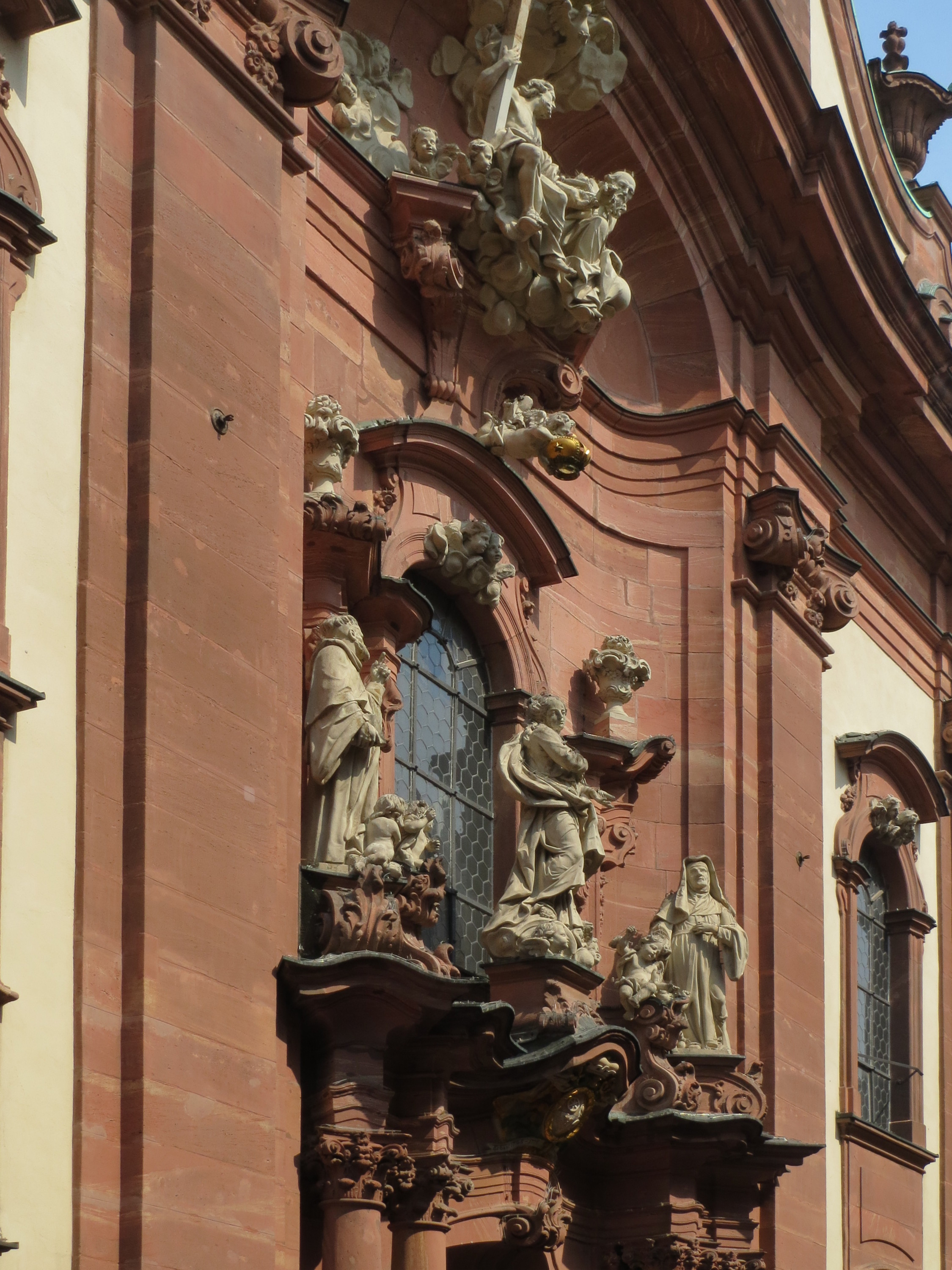 Fassade der Augustinerkirche (Mainz). Die aus rotem Sandstein erbaute Fassade zeigt in ihrem Figurenschmuck die Marienkrönung durch die Allerheiligste Dreifaltigkeit, der auch die Kirche geweiht ist, über dem Haupteingang. Flankiert wird die Szene von dem Ordensheiligen Augustinus, der eines seiner Hauptwerke über das Geheimnis der Trinität geschrieben hat, und seiner Mutter Monika. Künstler Nikolaus Binterim